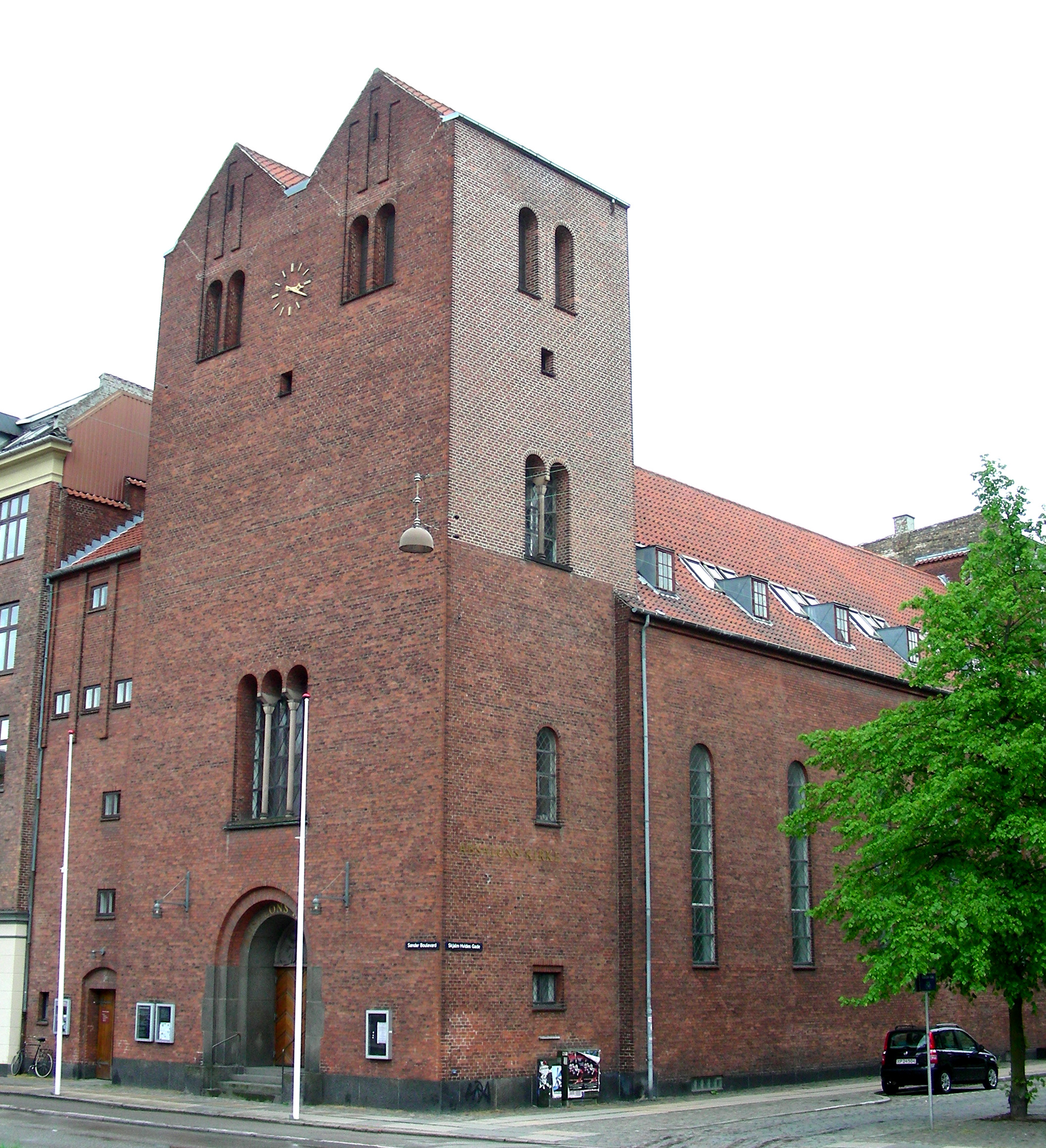 Absalons Kirke, Copenhagen, Denmark.